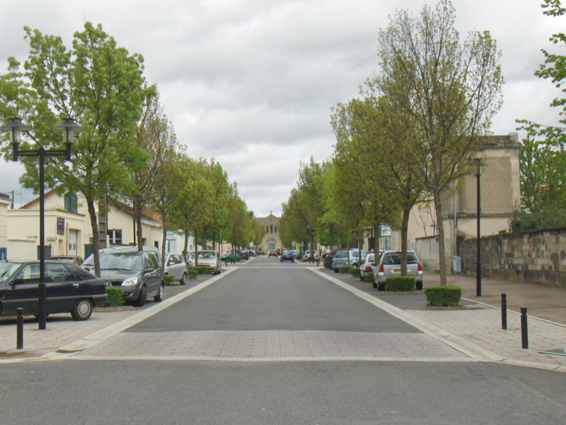 Cité des cheminots de Vauzelles, commune de Varennes-Vauzelles (Nièvre), dans la banlieue de Nevers, en Bourgogne.